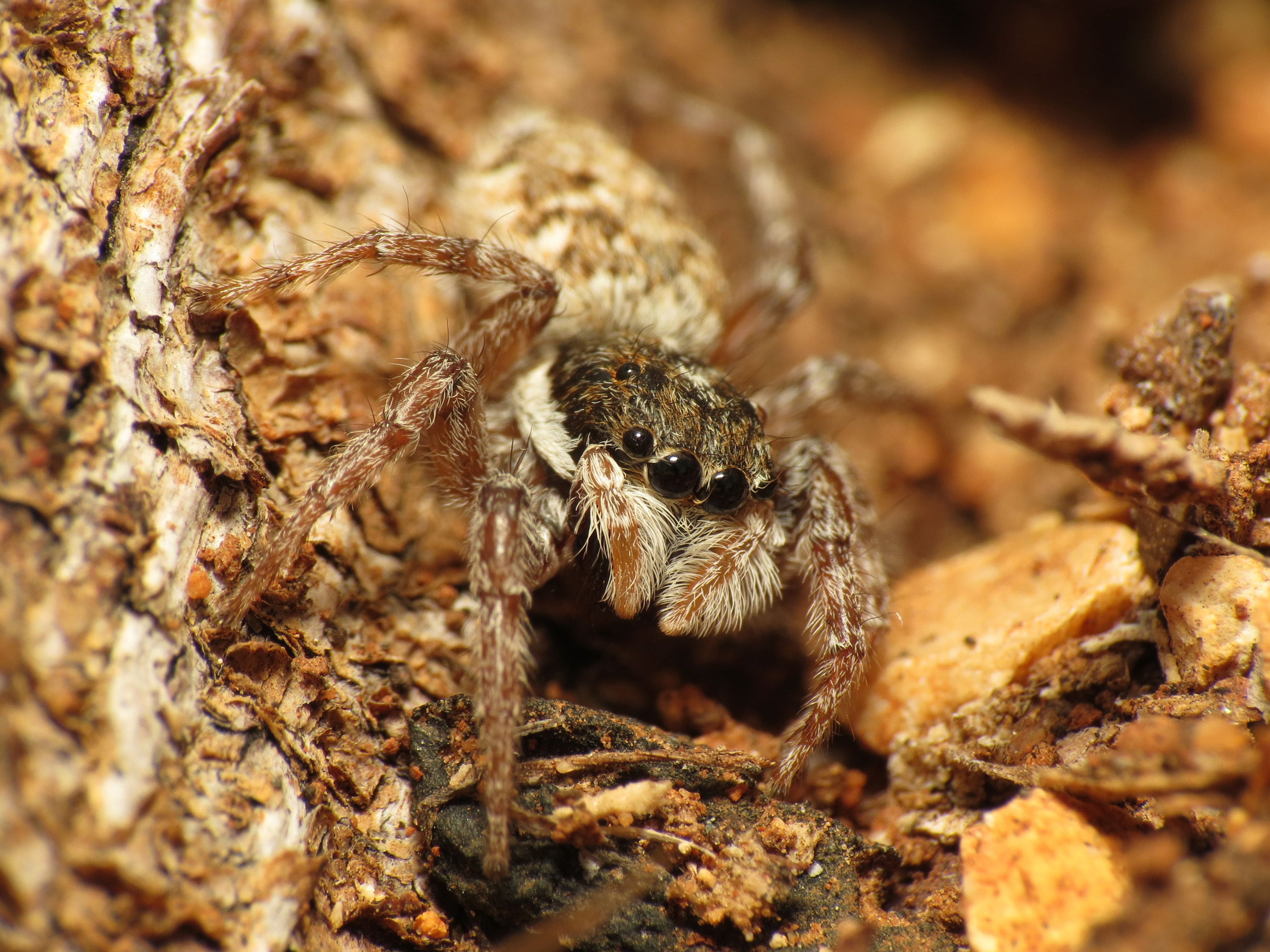 Menemerus semilimbatus . Els Poblets, Alicante, Spain